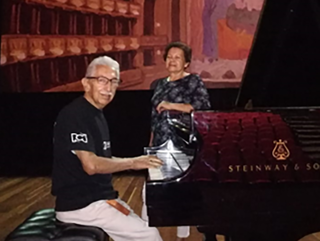 Guillermo Quevedo afinador de pianos colombiano- Cartagena 2018